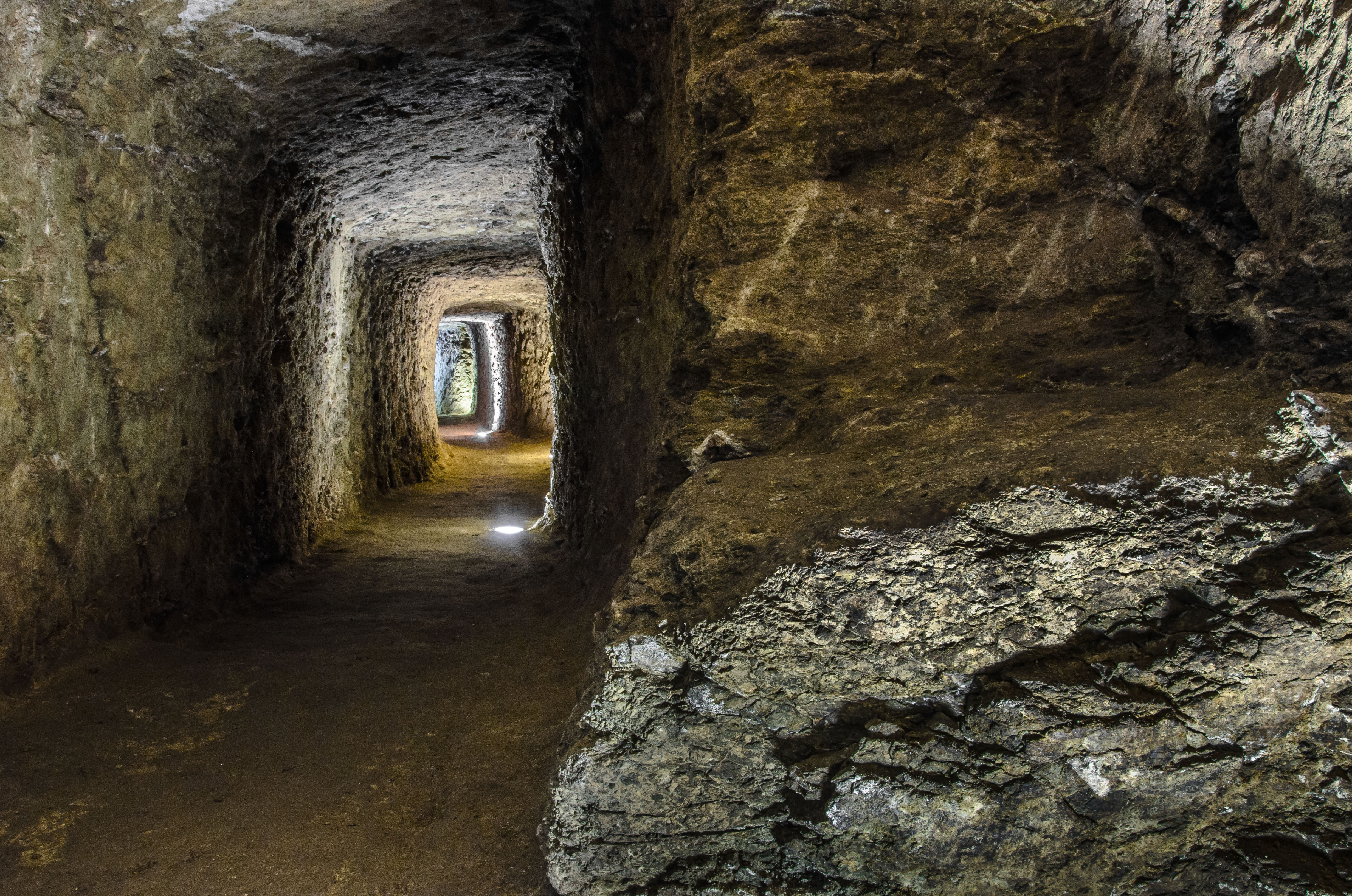 Podzemní chodba v Přeskačích.